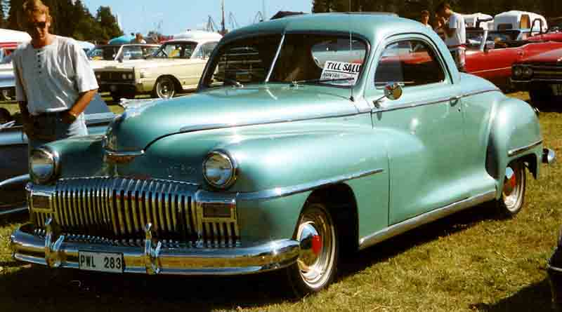 De Soto Deluxe Series Business Coupé 1948